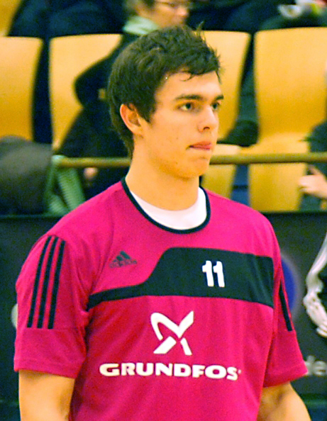 Den danske håndboldspiller Rasmus Lauge.